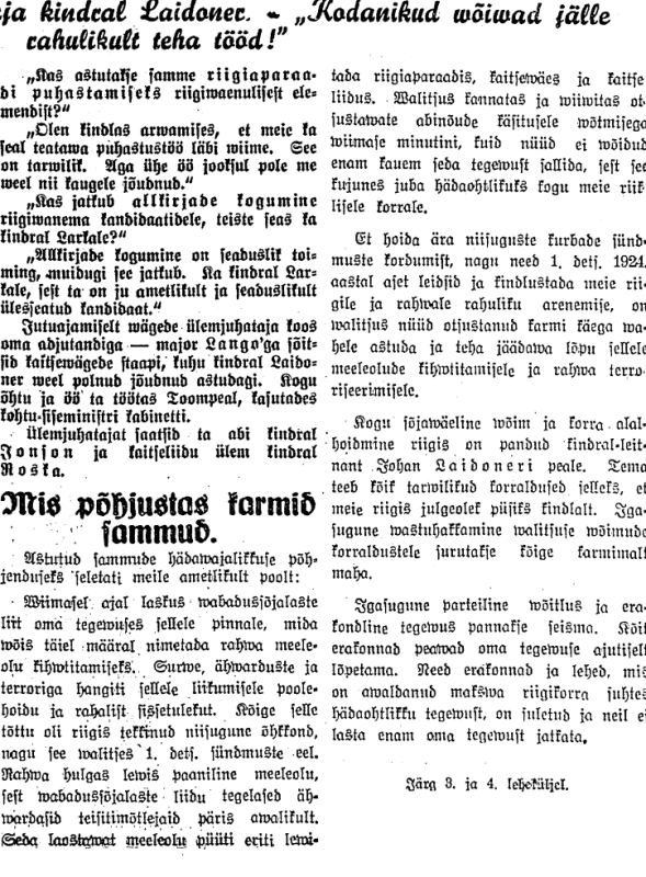 Ajaleht Kaja. Kaitseseisukorra põhjustest